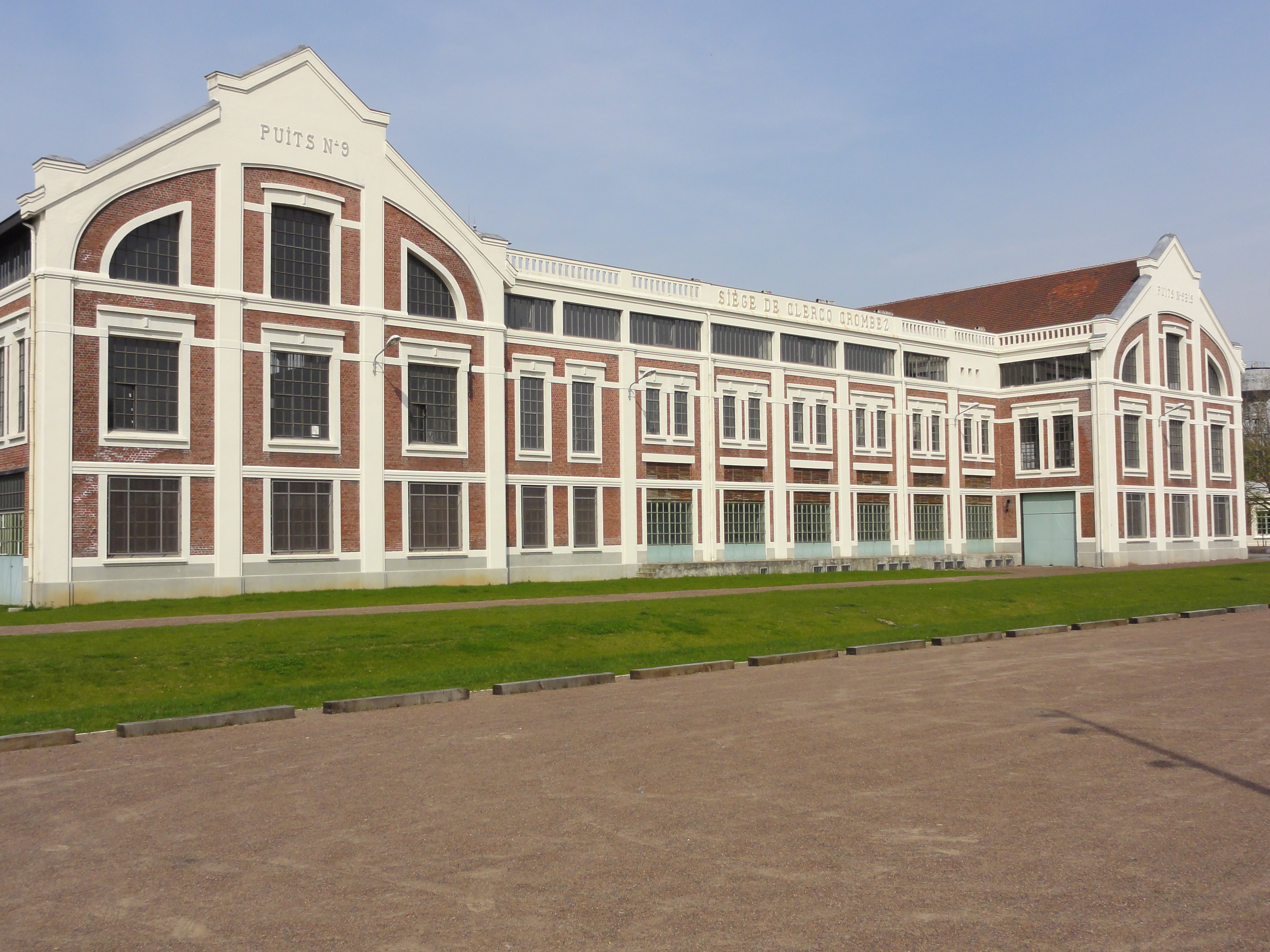 This building is en partie classé, en partie inscrit au titre des Monuments Historiques. .